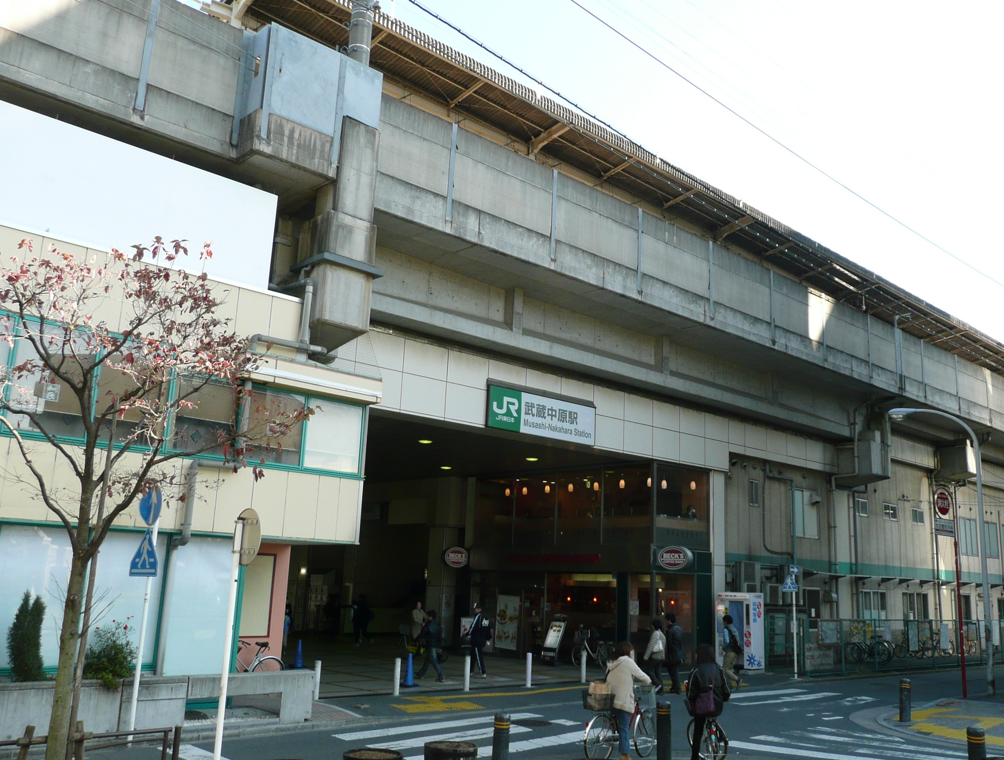 武蔵中原駅南口